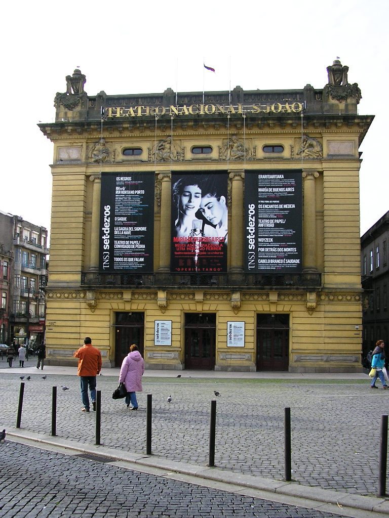 "São João" national theatre in Porto, Portugal.